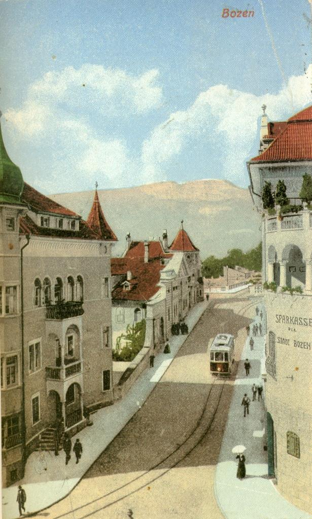 Die einstige Bozner Straßenbahn in der Museumstraße